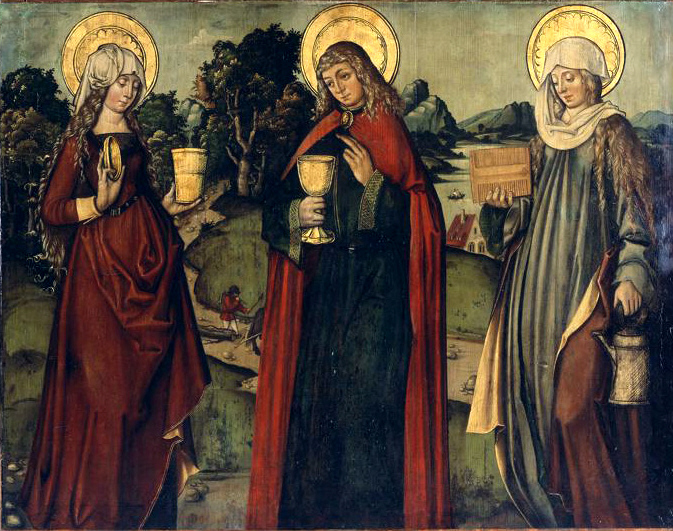 Altarflügelinnenseite mit Hl. Maria Magdalena, HL. Johannes Evangelist, Hl. Verena. Schweizerisches Nationalmuseum, Zürich, LM-35849